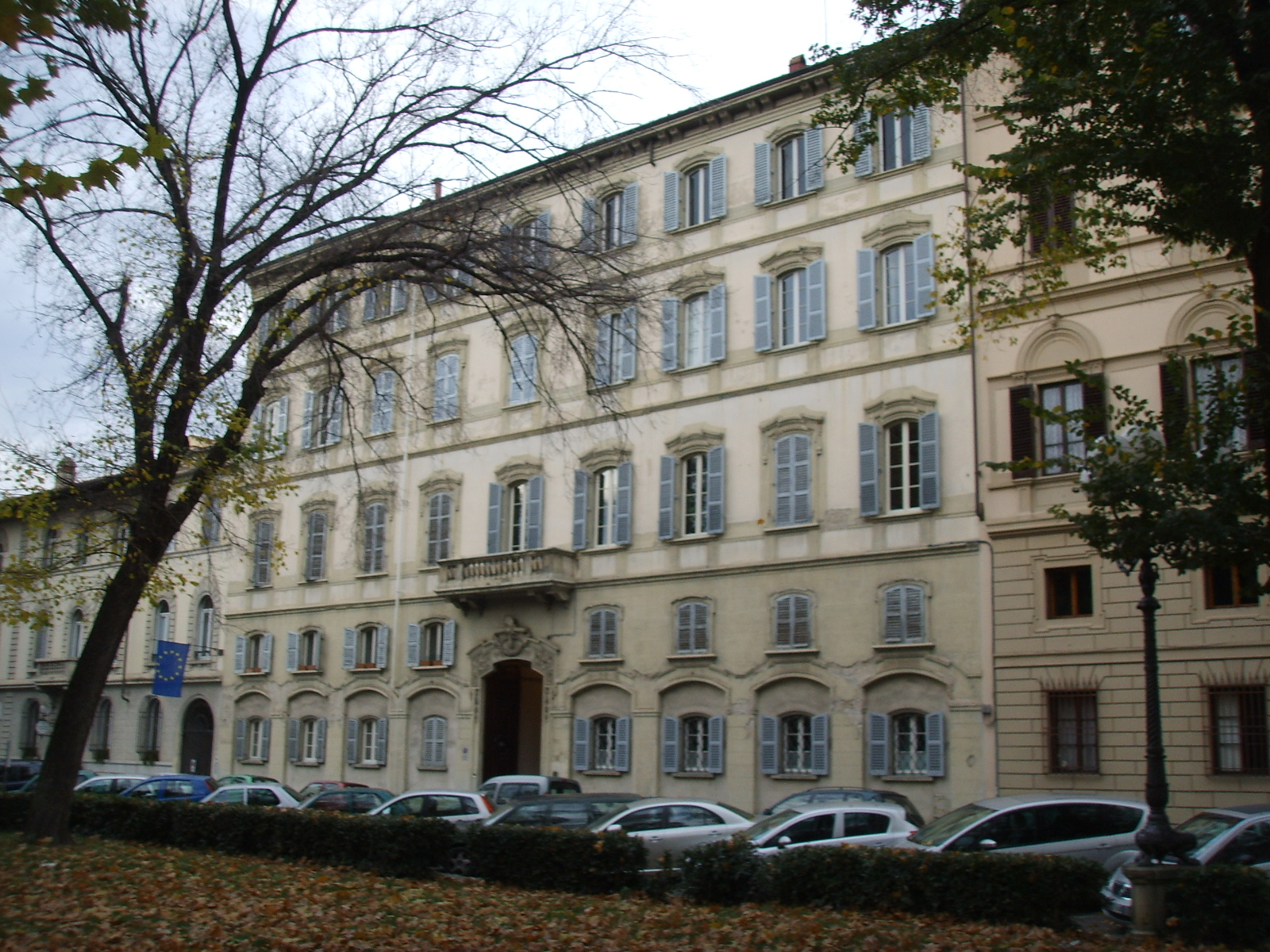 Palazzo in piazza d'azeglio